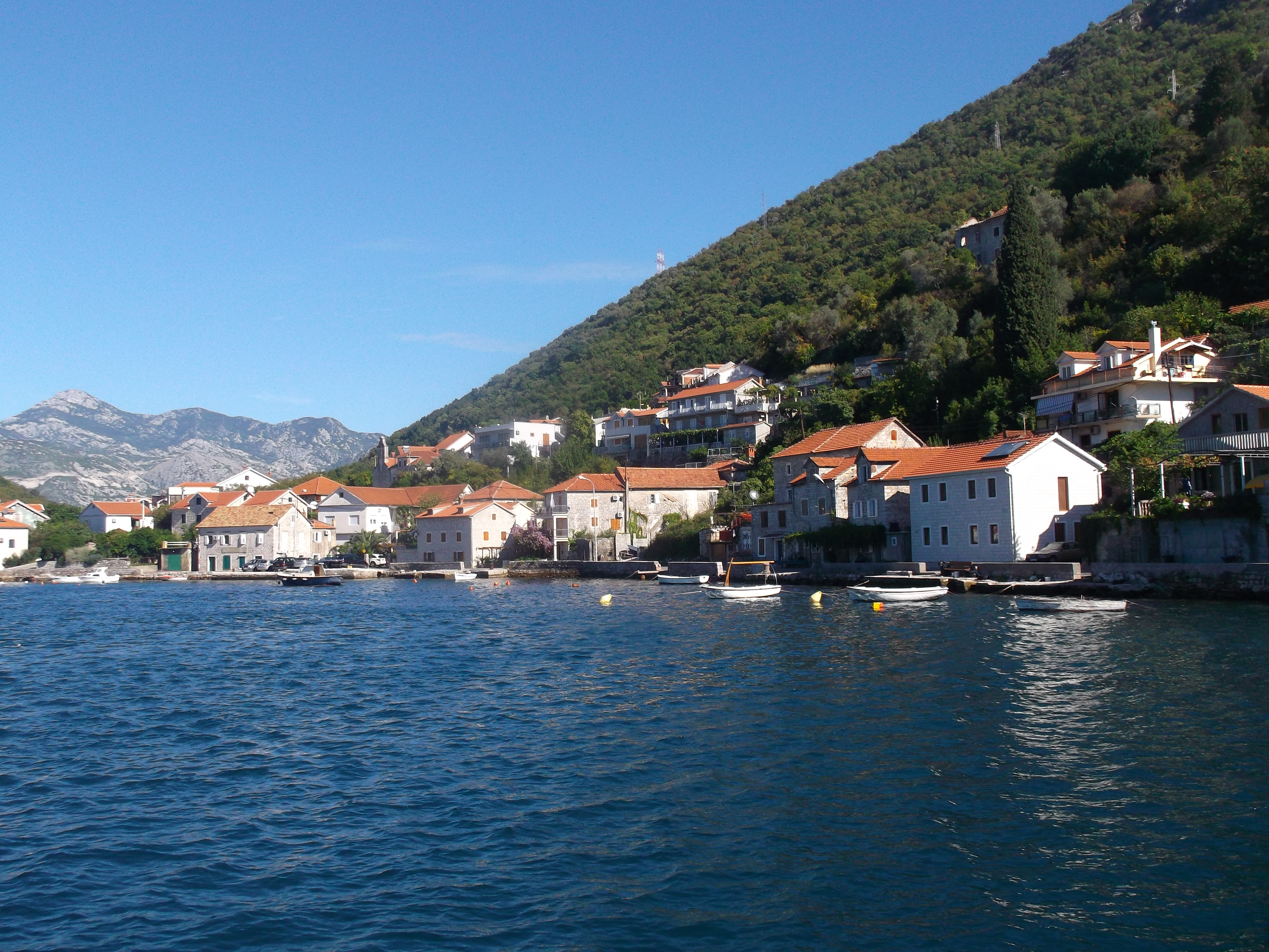 Jadranska magistrala, Lepetane, Montenegro